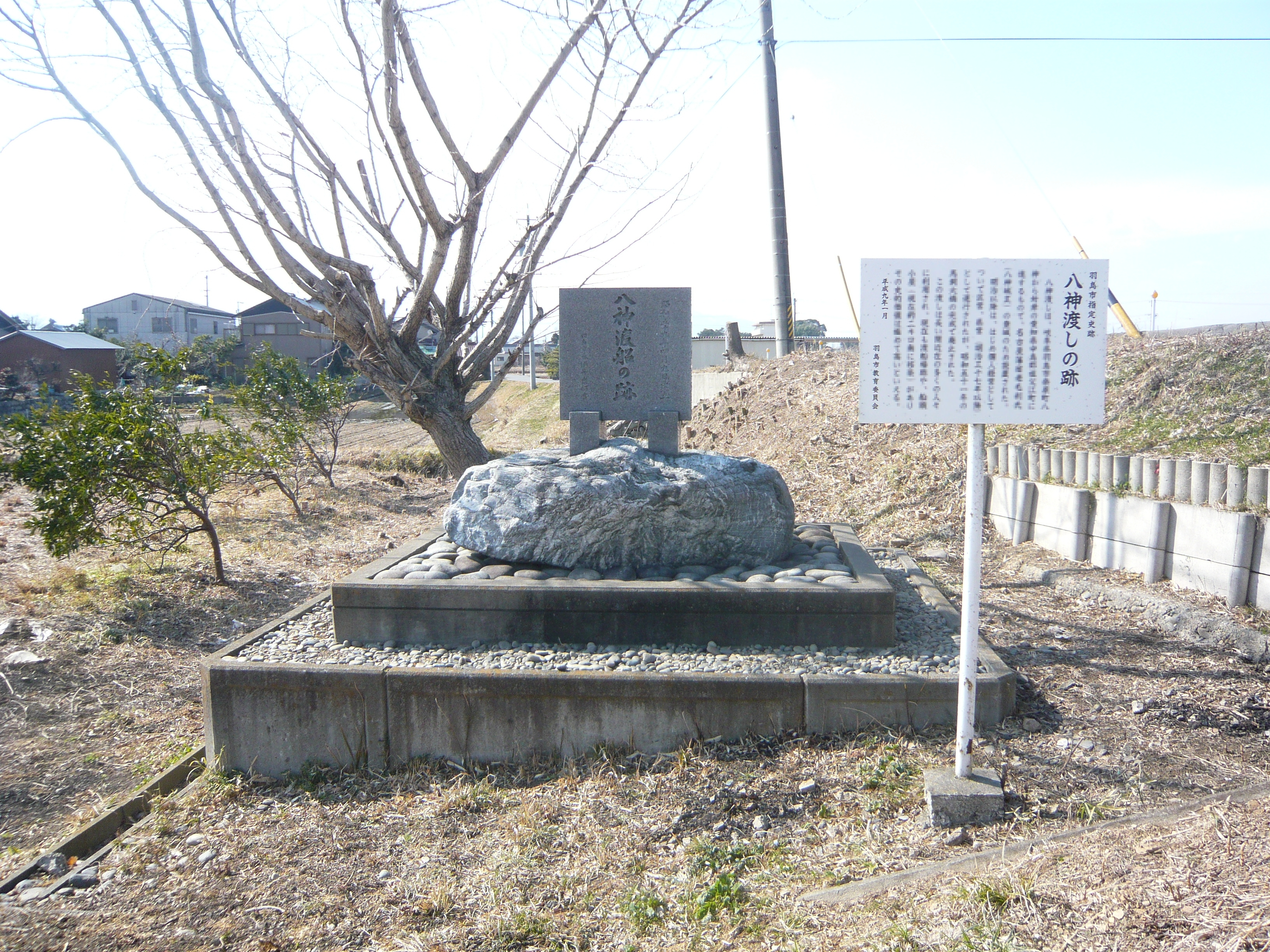 Yagami Ferry（八神渡船の跡）,Hashima,Gifu,Japan（岐阜県羽島市）で撮影。